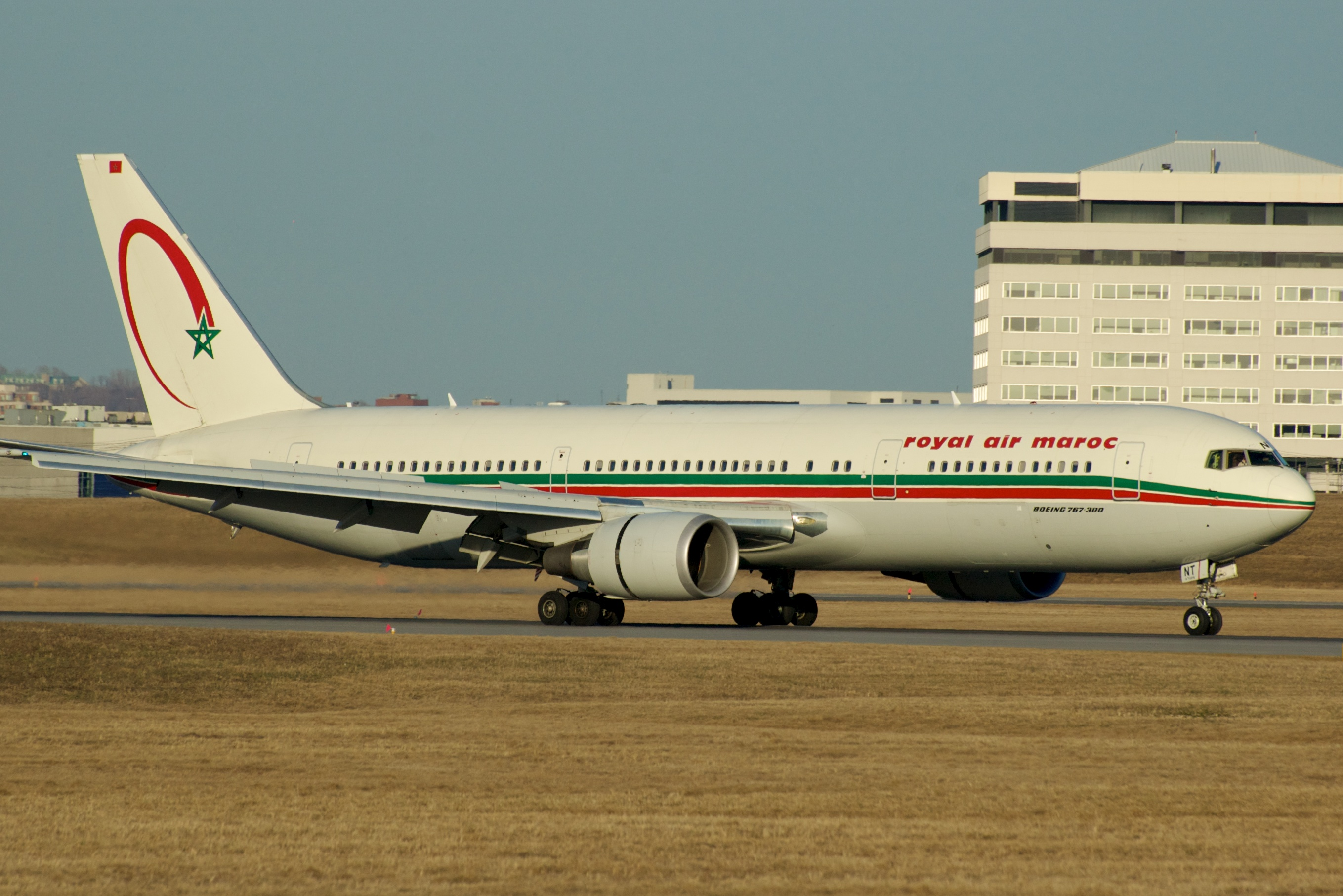 RAM 767-300 CN-RNT arriving Montreal-Turdeau, April 2007